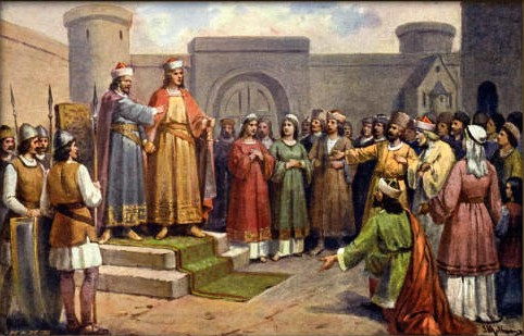 Josef Mathauser - oslepený kníže Jaromír ustupuje synovci Břetislavovi